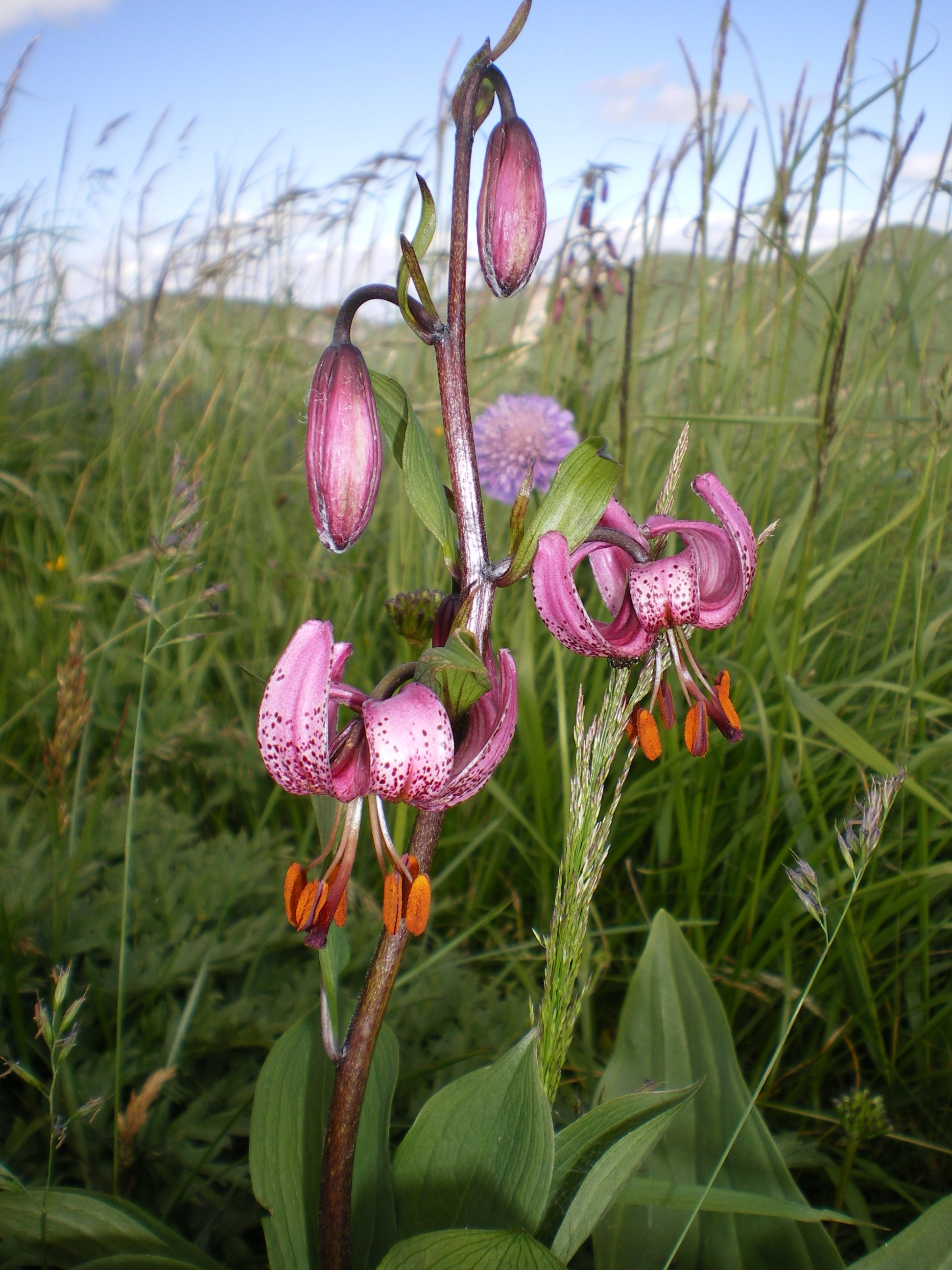 Dans le massif du Sancy, floraison de lys Martagon, une espèce rare et protégée